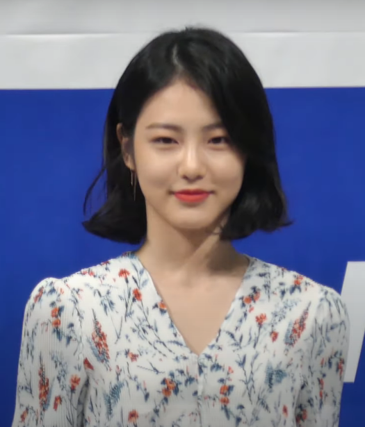 5일 오후 서울 강남구 논현동 임피리얼 팰리스 서울에서 tvN 새 월화드라마 '사이코메트리 그녀석' (이하 '그녀석') 제작발표회가 열렸다. 이날 제작발표회에는 갓세븐 진영, 신예은, 김권, 김다솜이 참석해 자리를 빛냈다.